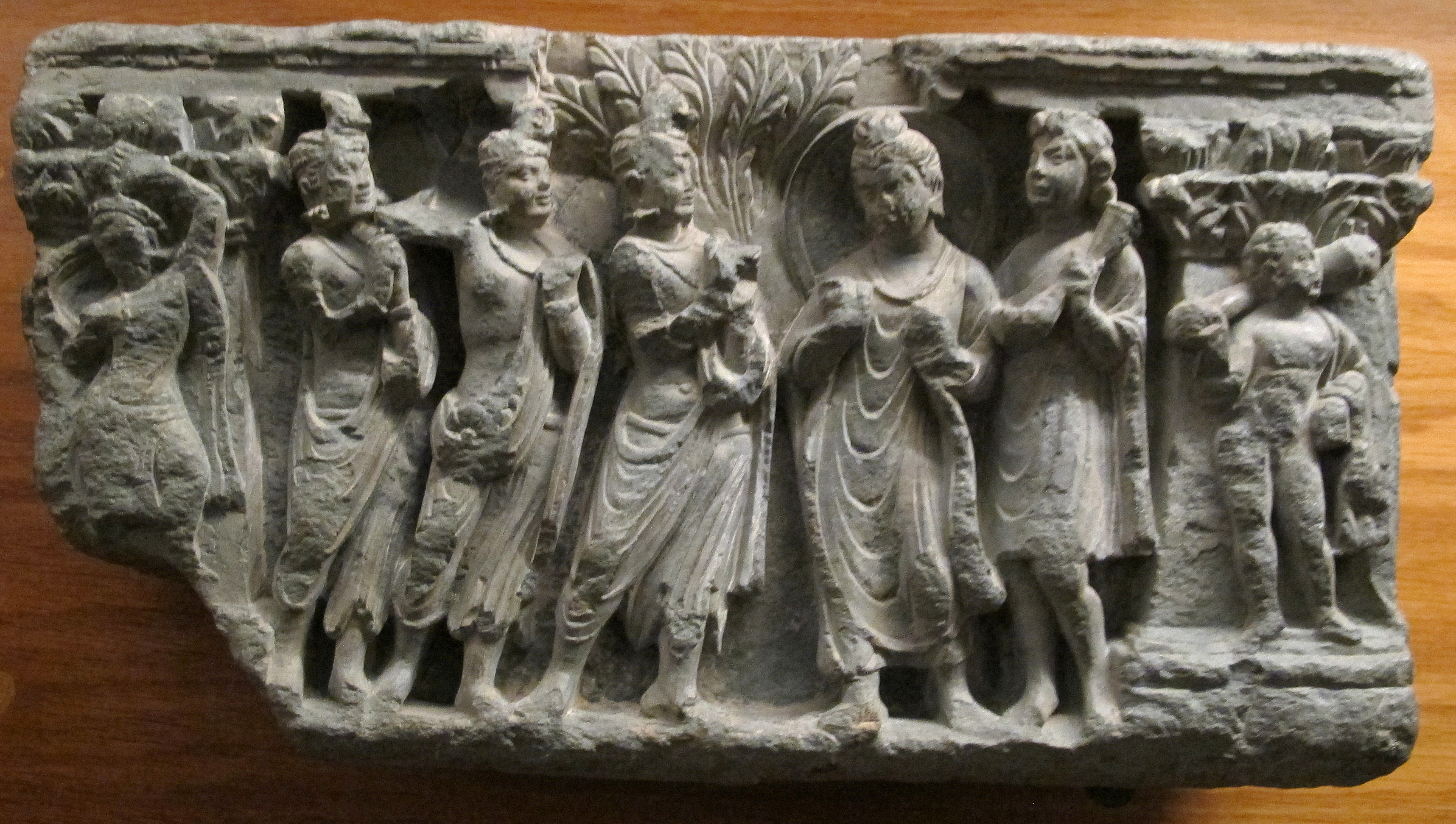 DetailOfferta di fiori al Buddha. (Rilievo con visita agli acseti ??). Rilievo, "stile naturalistico", schisto verde, Butkara I